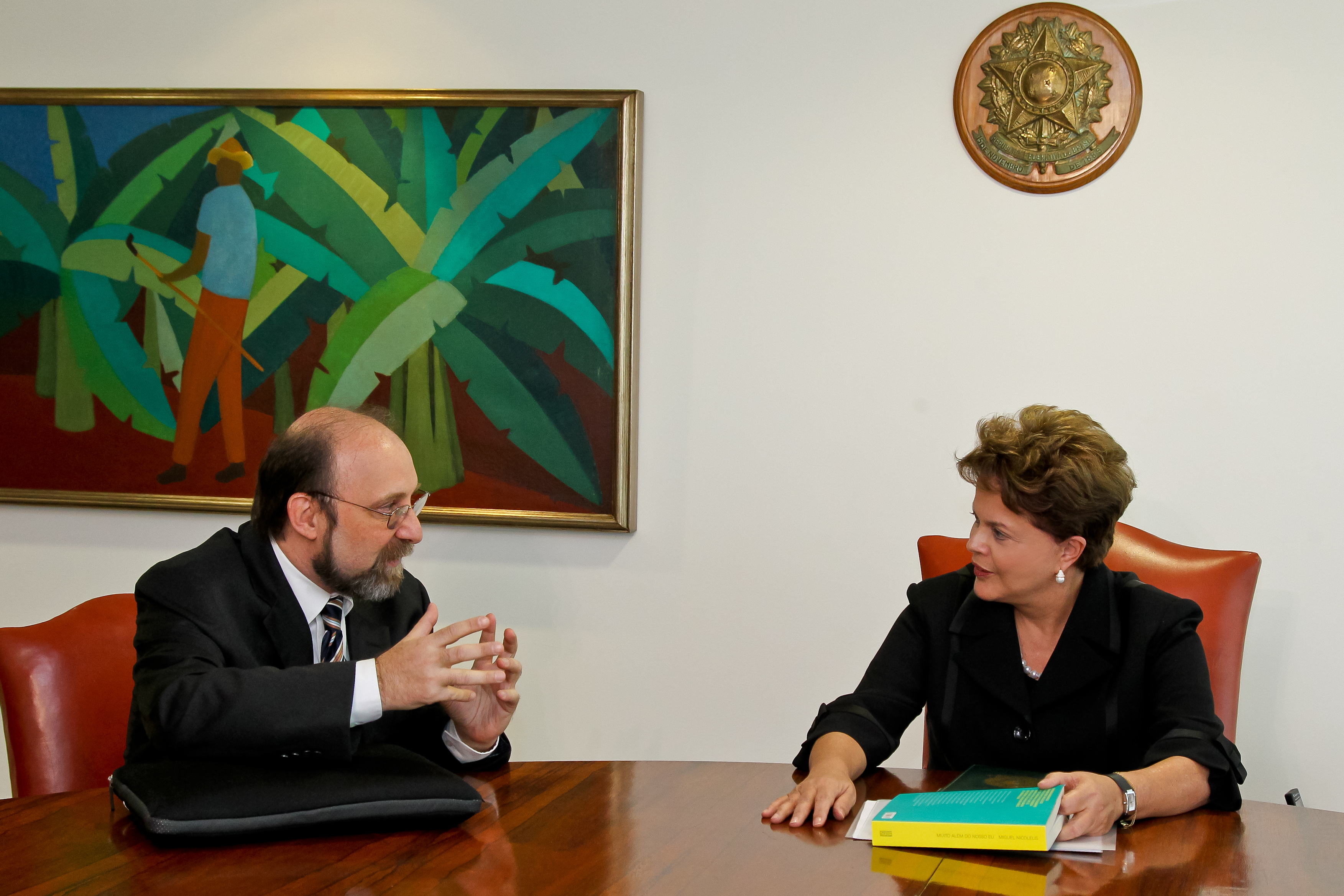 Brasília - DF, 14/07/2011. Presidenta Dilma Rousseff recebe o neurocientista, Minguel Nicolelis no Palácio do Planalto. Foto: Roberto Stuckert Filho/PR.